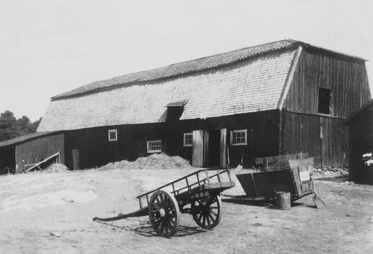 Gården Stensborg i Västberga, stall, ladugård och loge